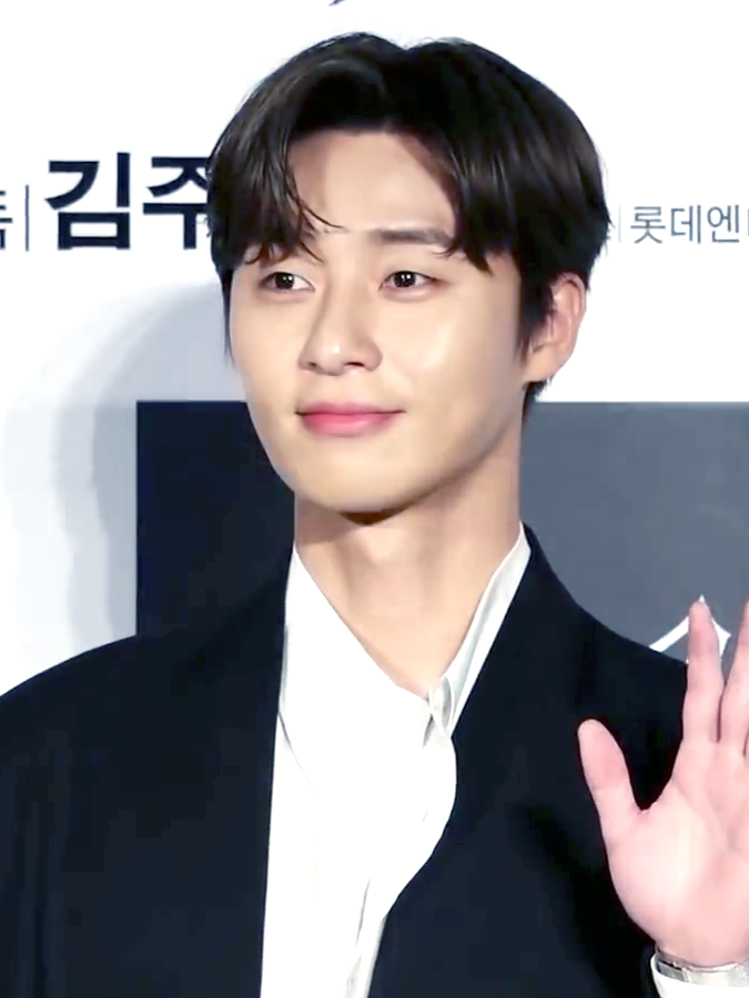 영화 '사자' 제작보고회가 26일 오전 서울 광진구 자양동 롯데시네마 건대입구점에서 열렸다.